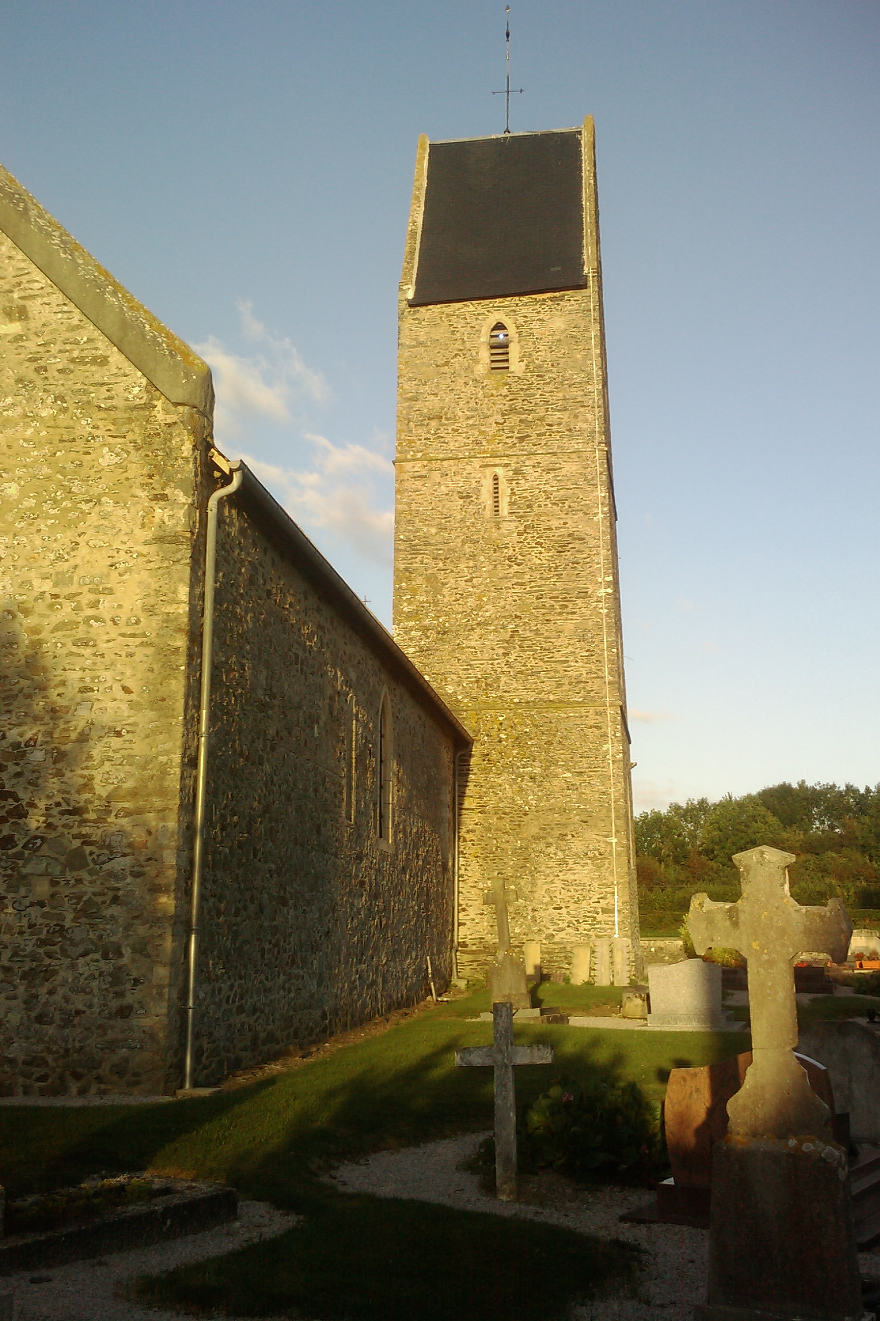 Église Notre-Dame de Rampan